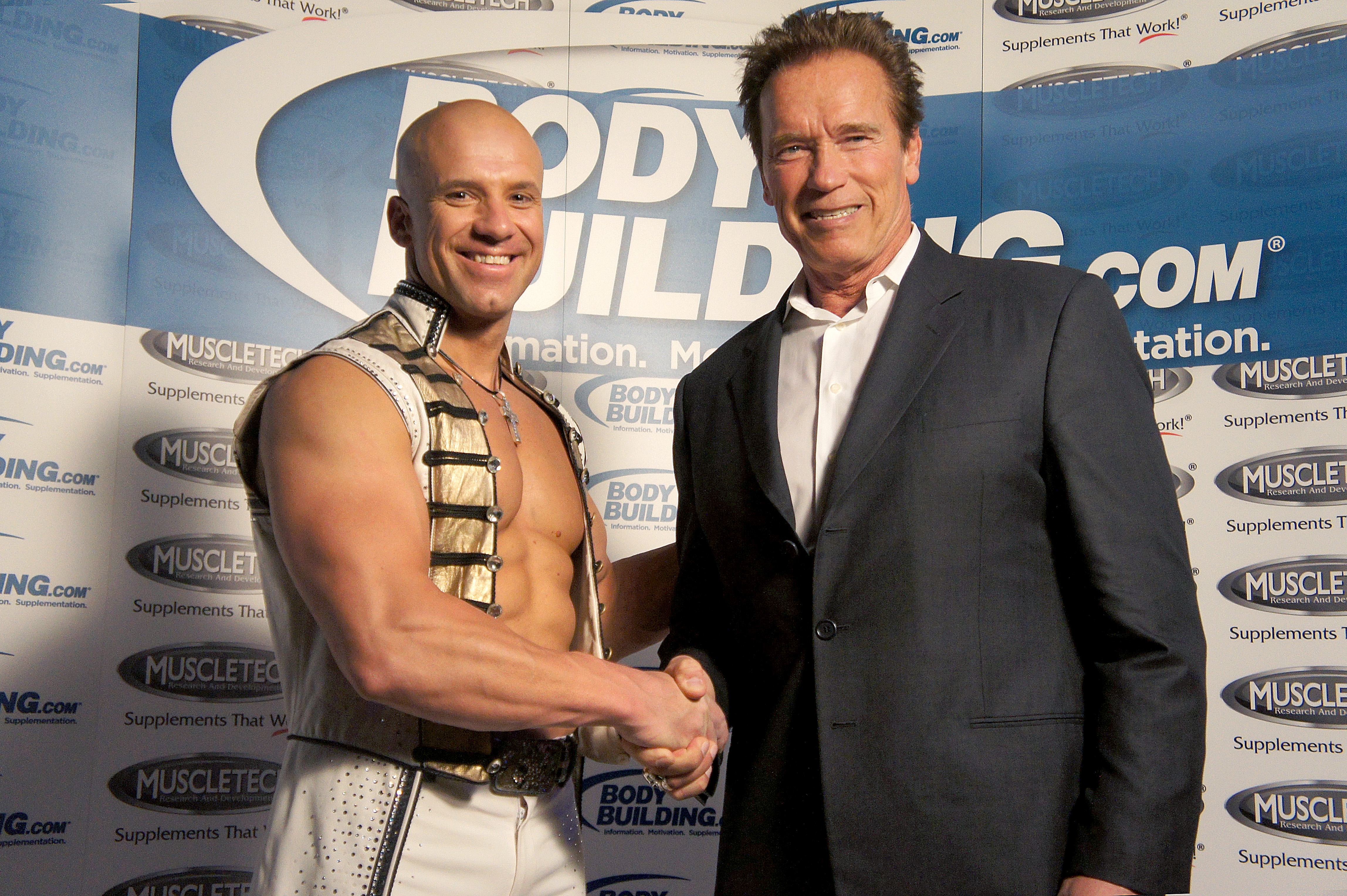 Encho Keryazov mit Arnold Schwarzenegger 2012